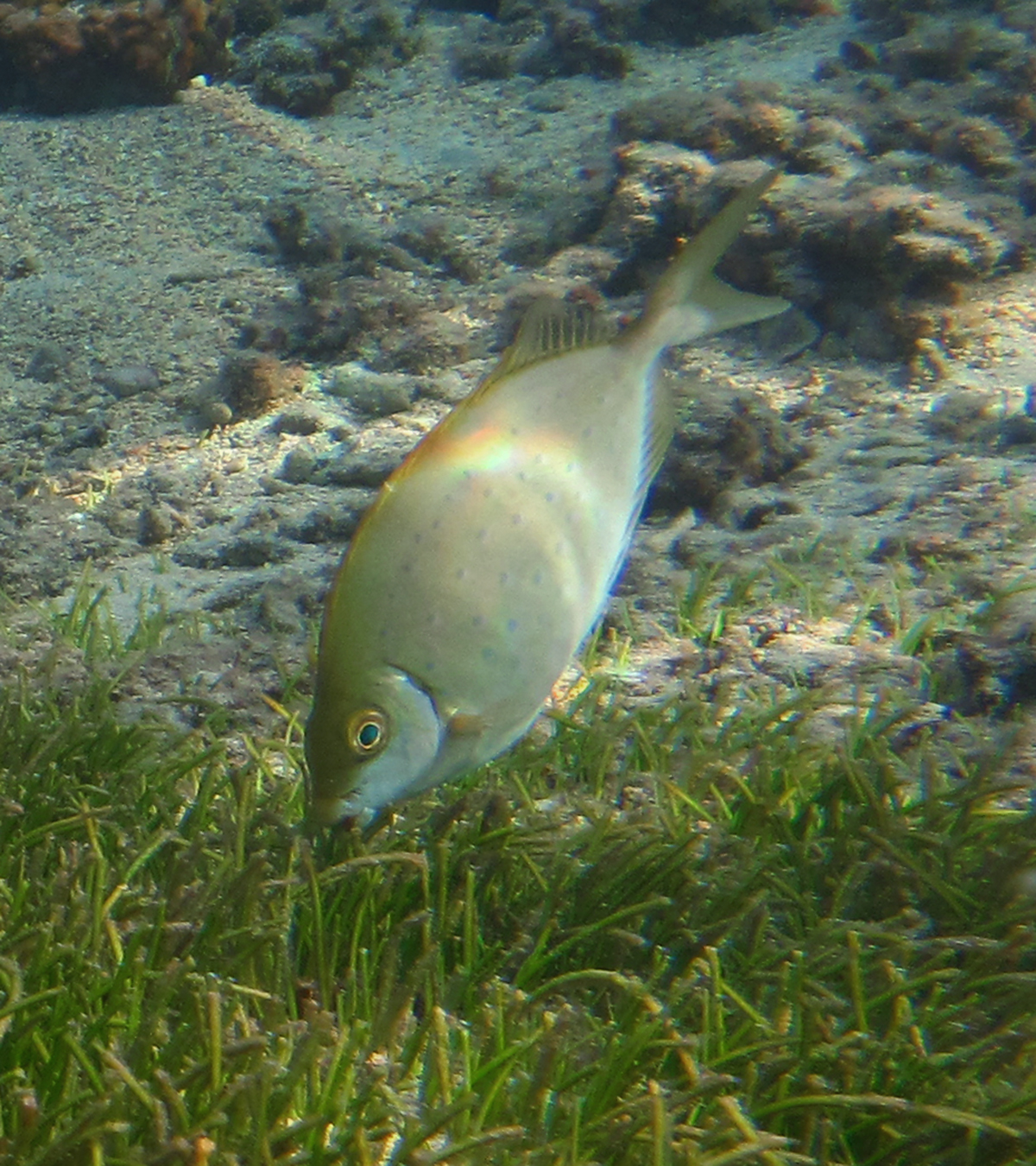 Un poisson-lapin moucheté (Siganus sutor) à la Réunion.